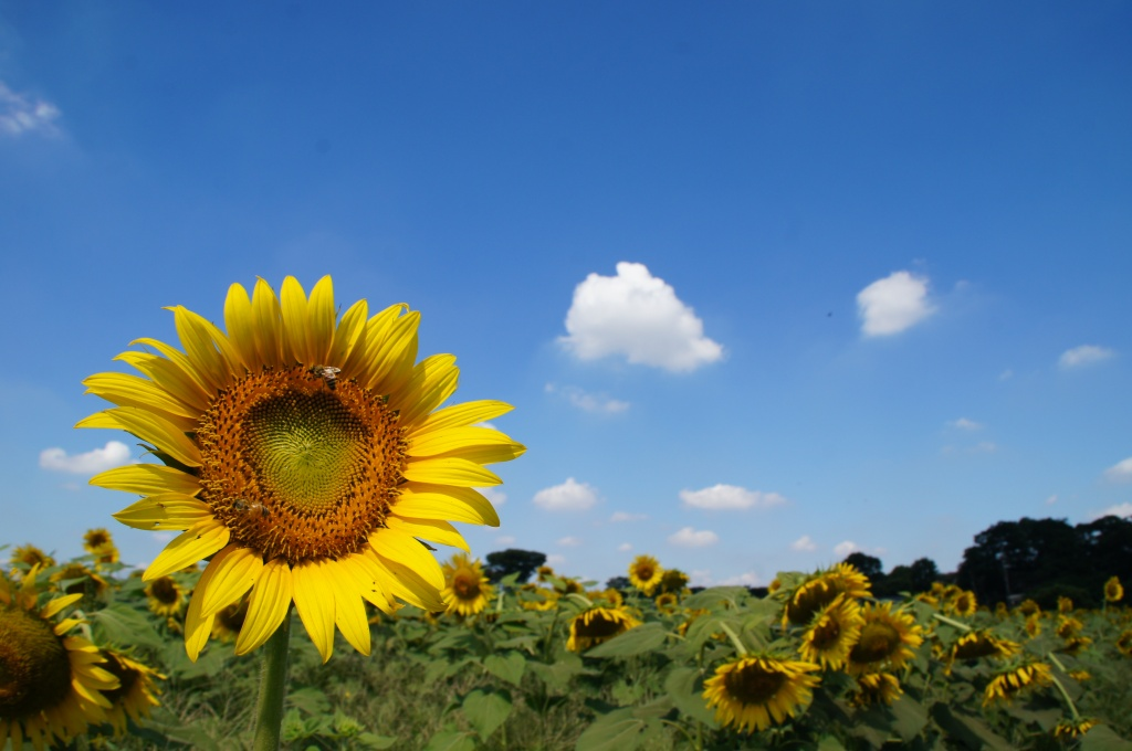 清瀬市下清戸のひまわり畑。2012年8月下旬撮影。